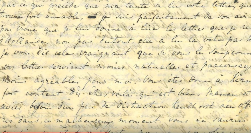 Belle van Zuylen: Briefwisseling met haar neef Willem René van Tuyll van Serooskerken.